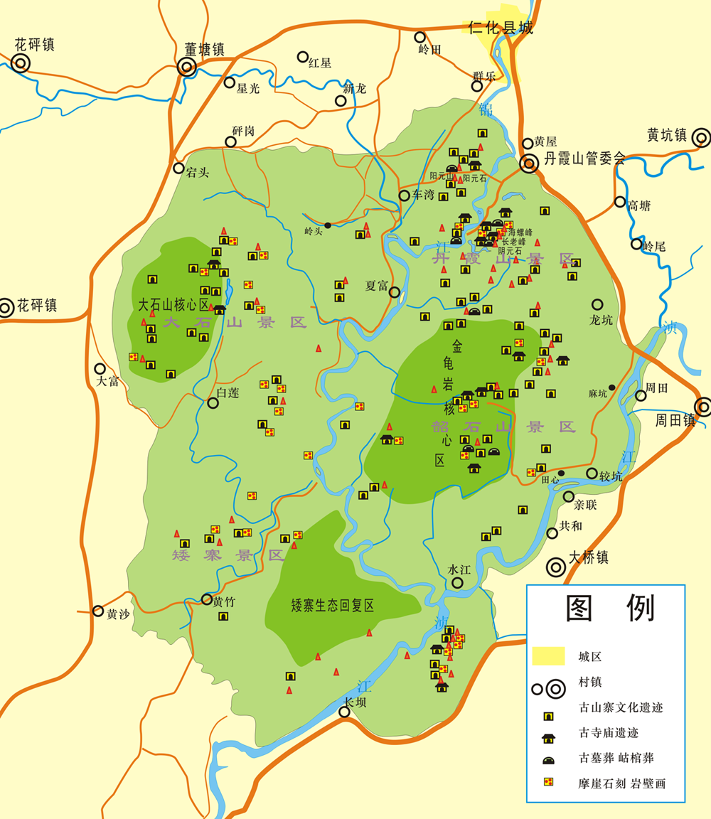 丹霞山世界地质公园全图 绘制人:竹围墙 绘制时间:2005/4/30